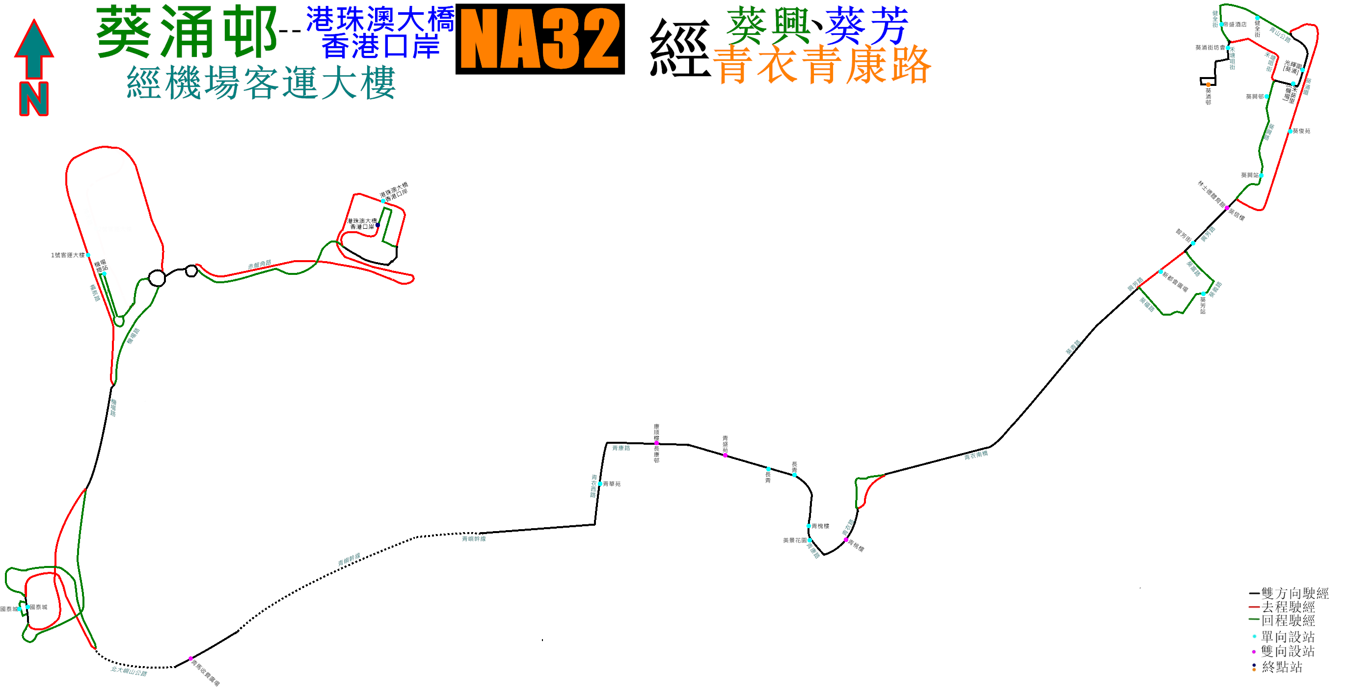 龍運巴士NA32線的走線圖